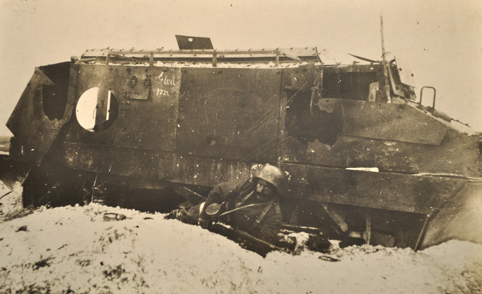 Zerstörter französischer Panzer als Ziel von zivilen Spaziergängern bei Reims / andere Panzer, u.a ein kleiner Panzer (Schneider CA1).